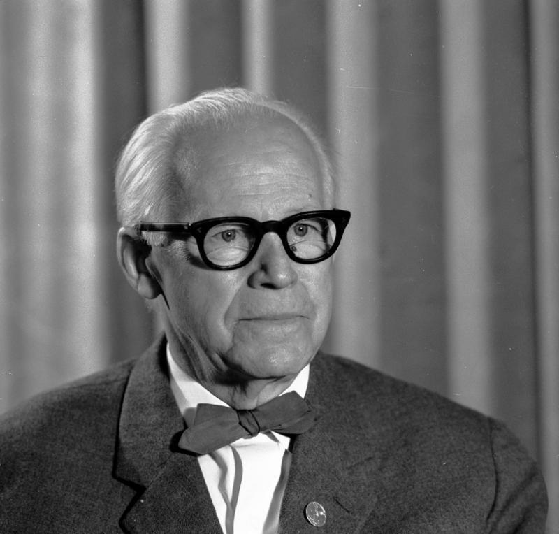 Walter Friedrich Zentralbild/Aschneder 19.9.1962 Prof. Dr. phil. Dr. med.h.o. Walter Friedrich, Nationalpreisträger. Hervorrragender Wissenschaftler des Volkes. Präsident des Instituts für Medizin und Biologie in Berlin-Buch und Mitglied des Präsidiums der Akademie der Wissenschaften zu Berlin. [Prof. Dr. phil. med.h.o. Walter Friedrich (Porträt)] Abgebildete Personen: Friedrich, Walter Prof. Dr.: Rektor der Humboldt-Universität Berlin, Präsident der Akademie der Wissenschaften (AdW), DDR (PND 118535935)